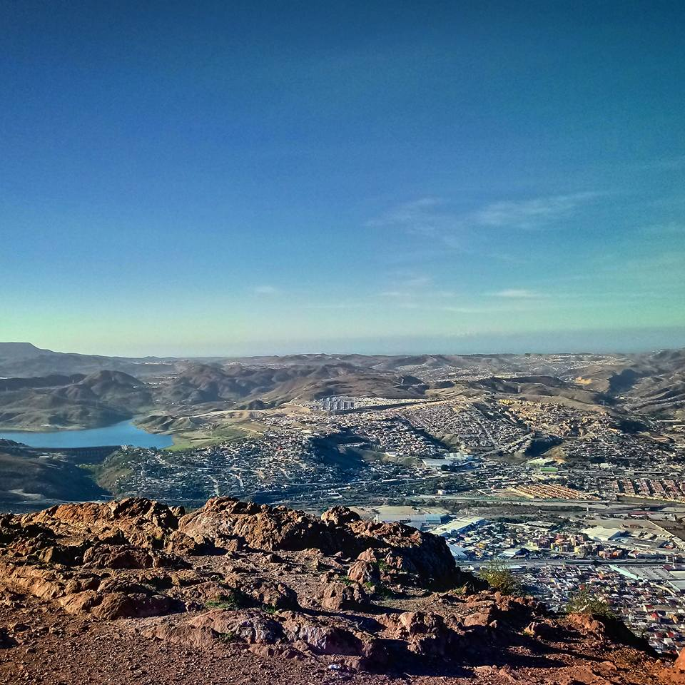 Vista desde la cima del Cerro Colorado en Tijuana hacia el lado sur de la ciudad